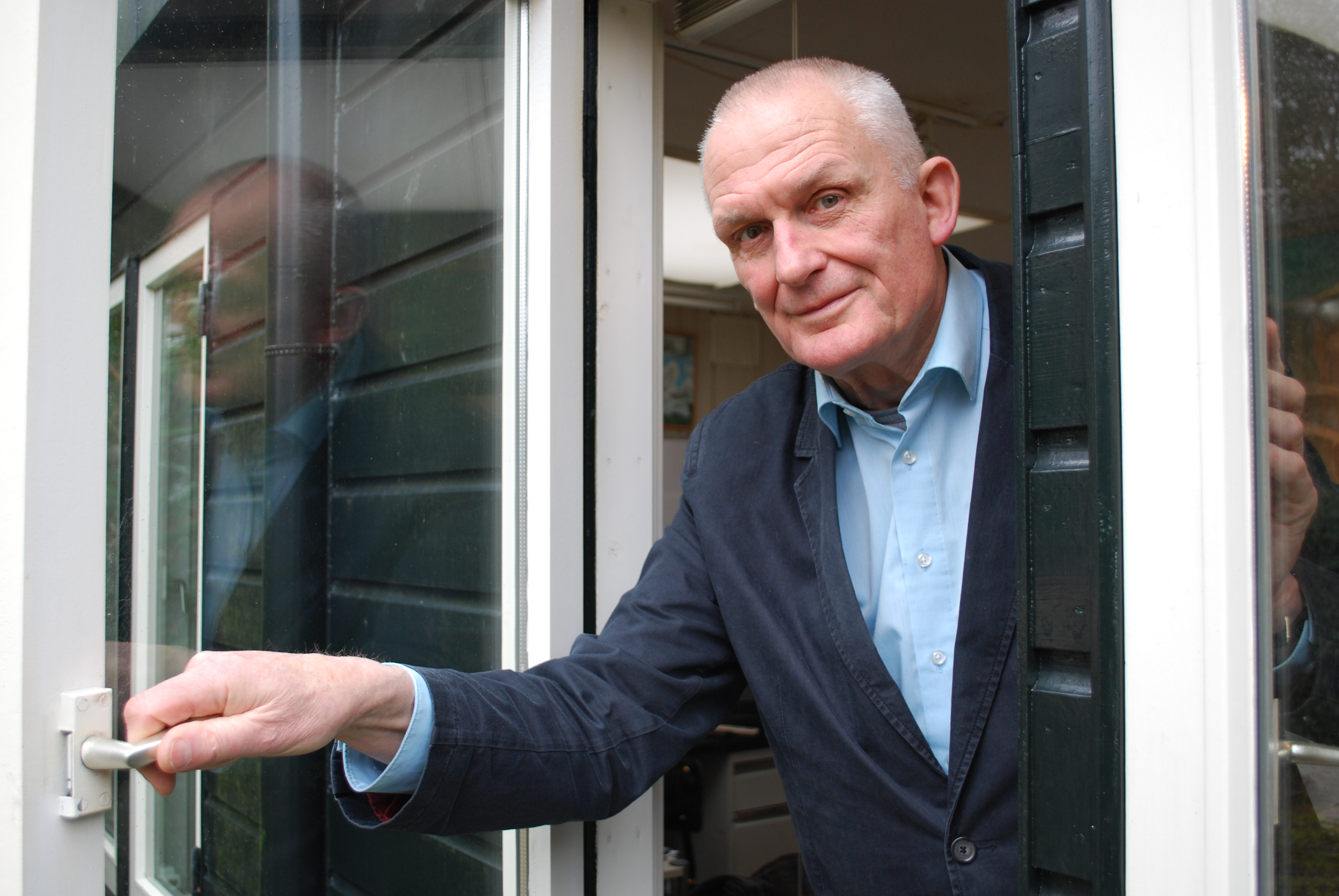 Televisiepersoonlijkheid Wim de Bie